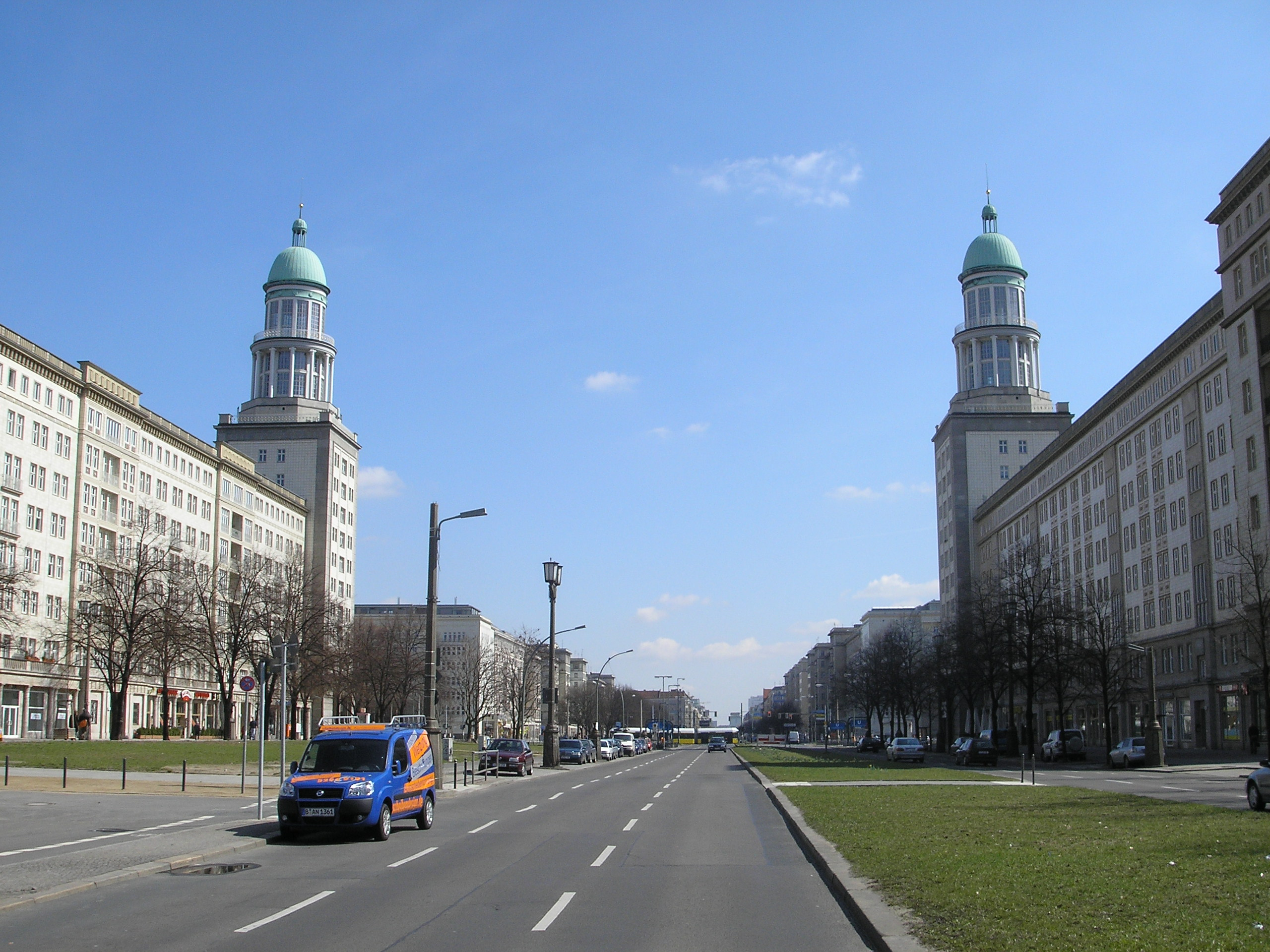 Blick auf Türme des Frankfurter Tors in Berlin. Bauzeit: 1957-1961. Architekten: Hermann Henselmann. View of North Tower of Frankfurter Tor in Berlin.